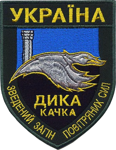 Емблема зведеного загону ВПС України, що несе службу між Авдіївкою і донецьким аеропортом